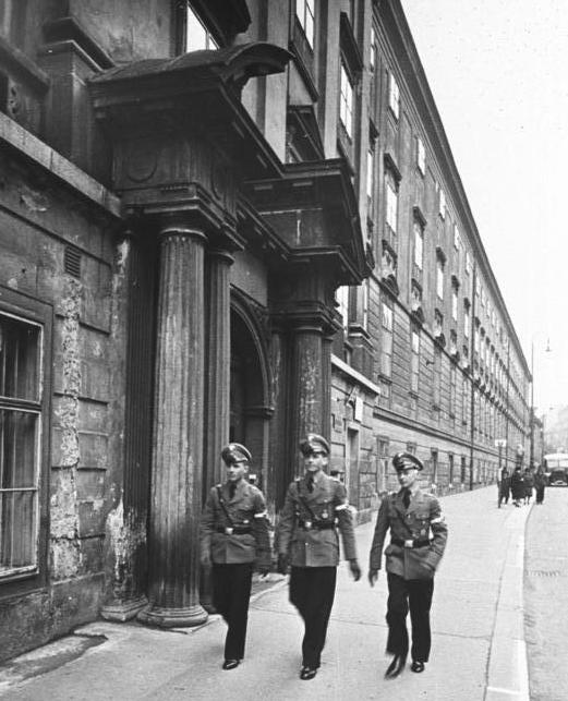 Nationalpolitsche Erziehungsanstalt In den alten Mauern der historischen Erziehungsanstalt Wiens, dem "Theresianum" zog der junge Geist der neuen deutschen nationalpolitischen Erziehung ein und in dem neuen Wien-Theresianum konnte in diesem Jahre der Gründungstag der ostmärkischen nationalpolitischen Erziehungsanstalt feierlich begangen werden.... Jungmannen der Anstalt des Wien-Theresianums verlassen am Sonnabend nachmittag nach dem Dienst in ihrer schmucken Uniform das historische Haus.